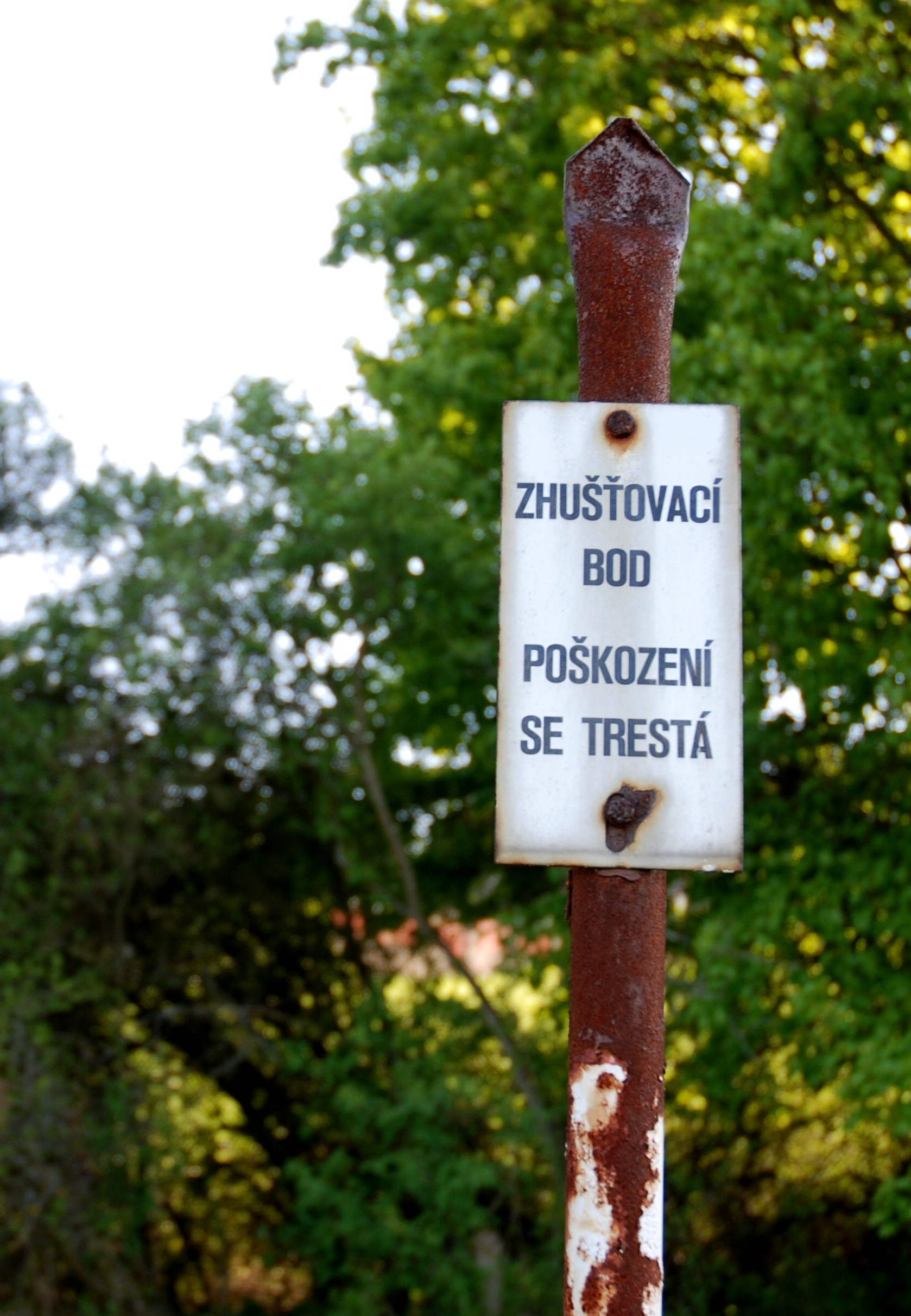 Nápis na ochranné tyči u zhušťovacího bodu.